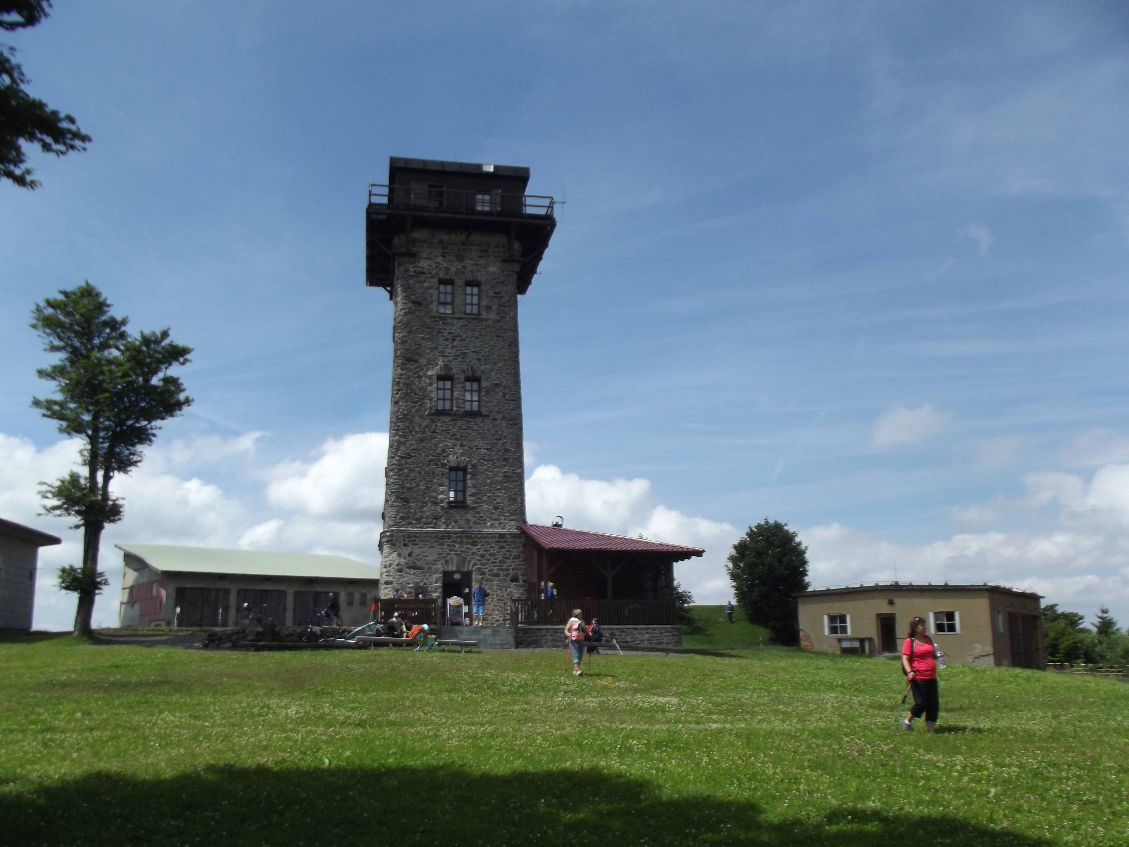 Kurzova rozhledna na vrcholu Čerchova (1042 m) v Českém lese.